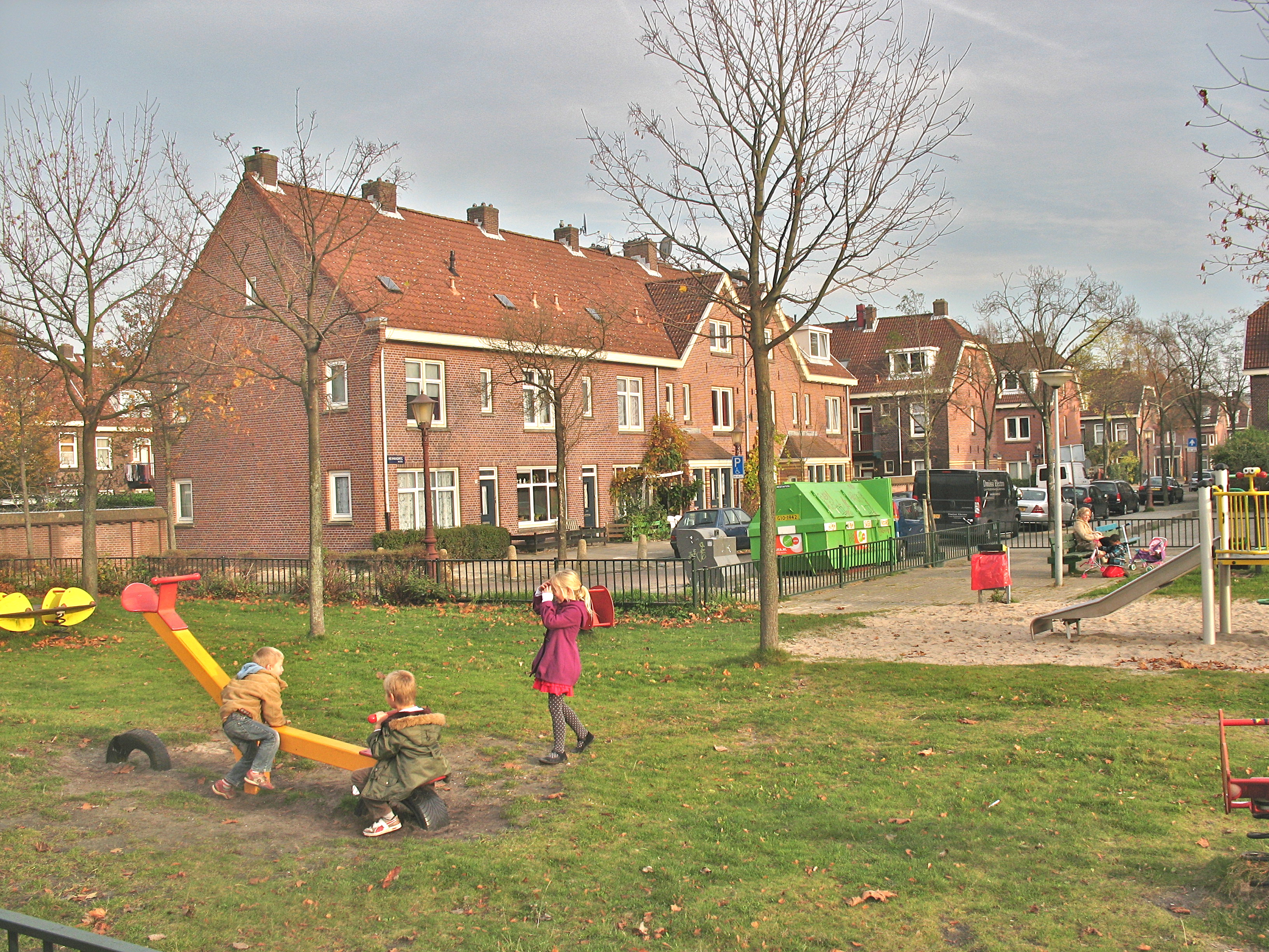 Woningen in de polder Buiksloterham, Amsterdam-Noord. Van der Pekbuurt, Heimansweg, speeltuin Volewijck